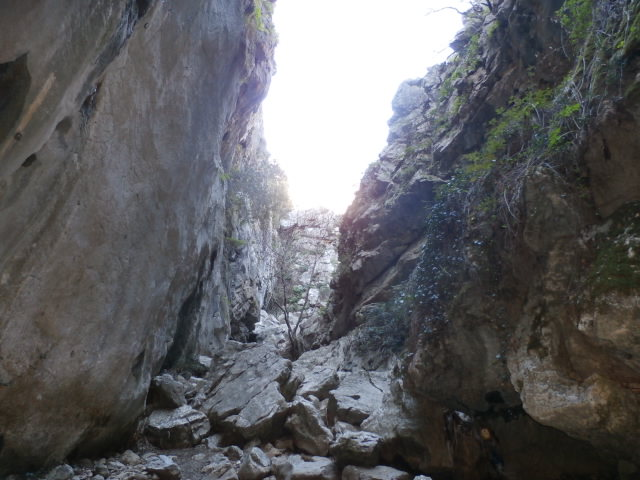 Foto tomada en la Sima de Villaluenga del Rosario.